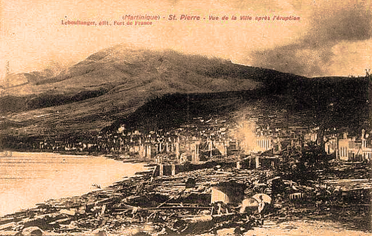 Martinique Saint-Pierre après l'éruption du Mont-Pelé